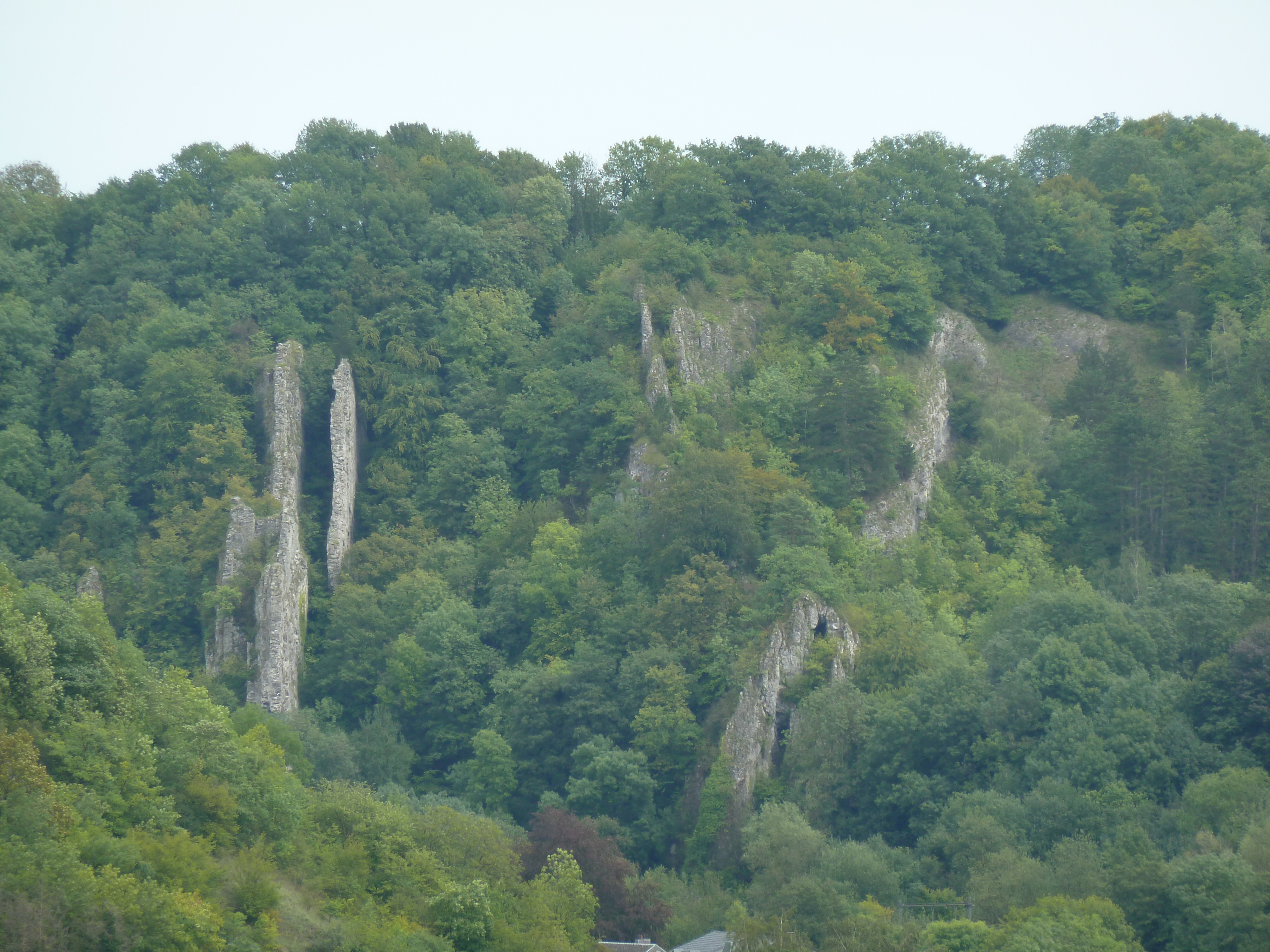 Rotsen van de Tartines, Comblain-au-Pont, België